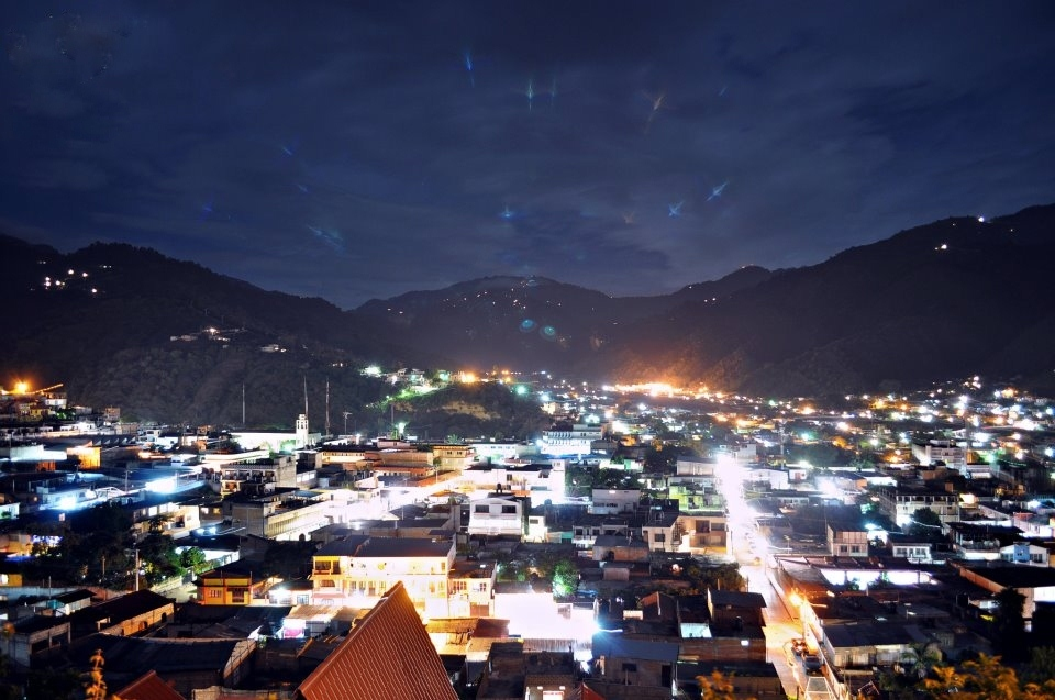 motozintla de noche